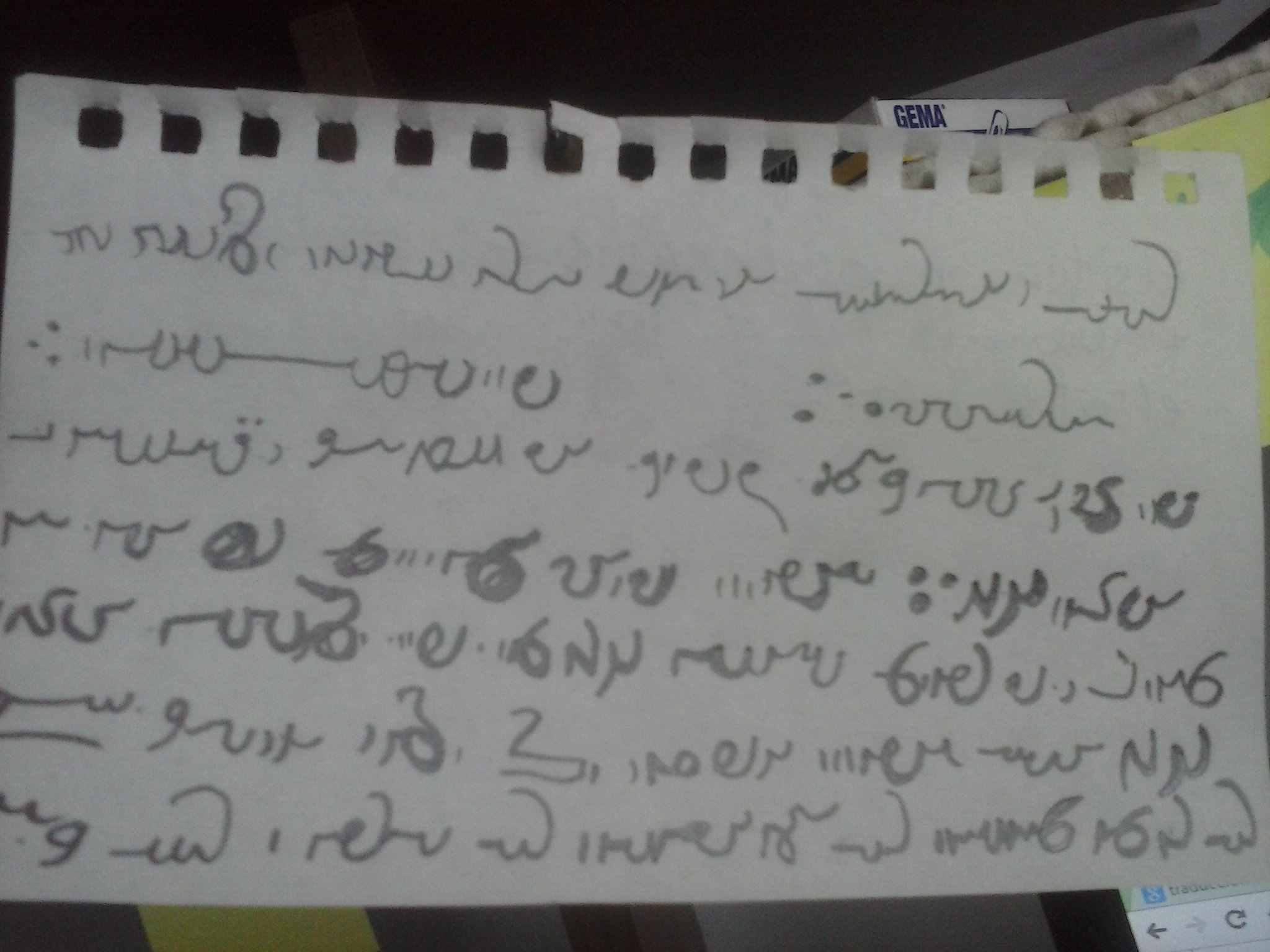 intento de escritura Pahleví